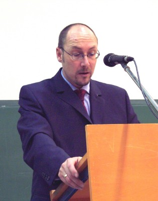 Portrait Michael Tilly